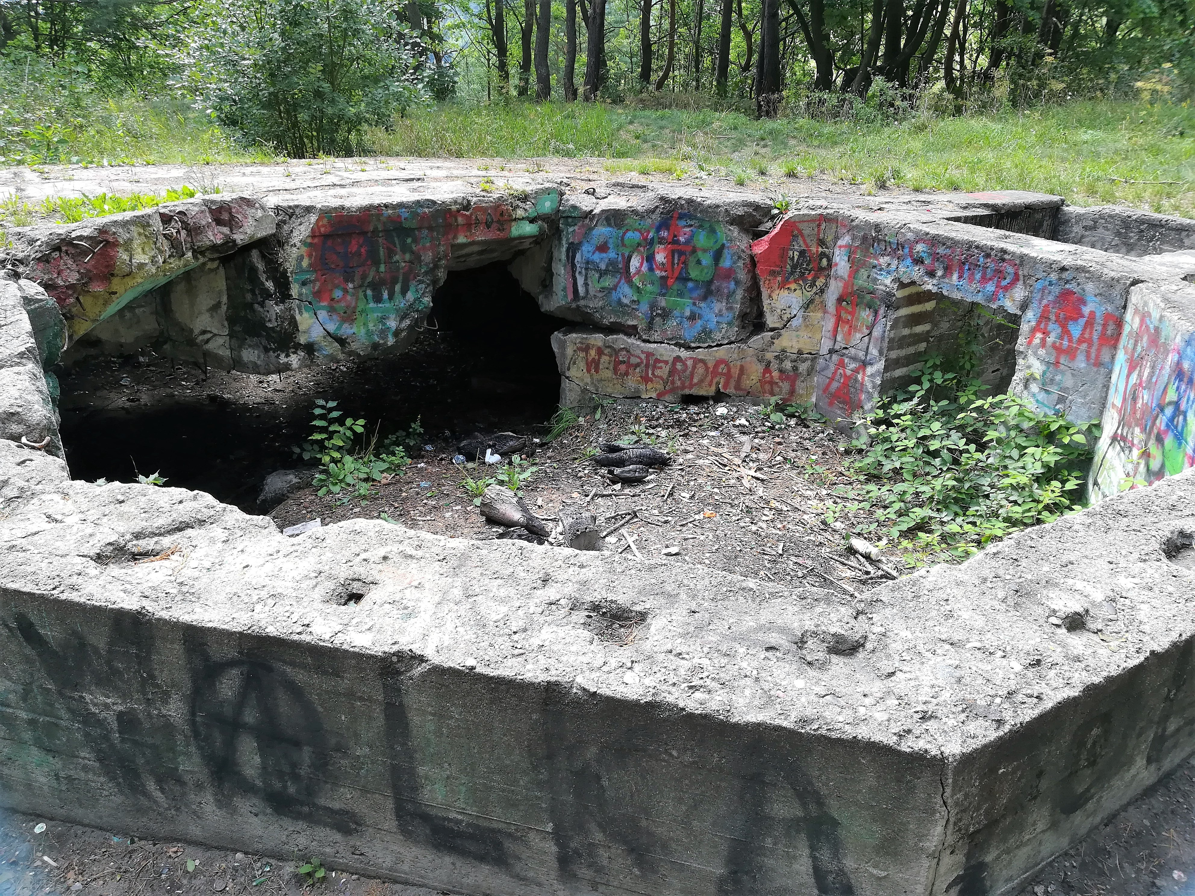 Góra Markowca w Rumii.